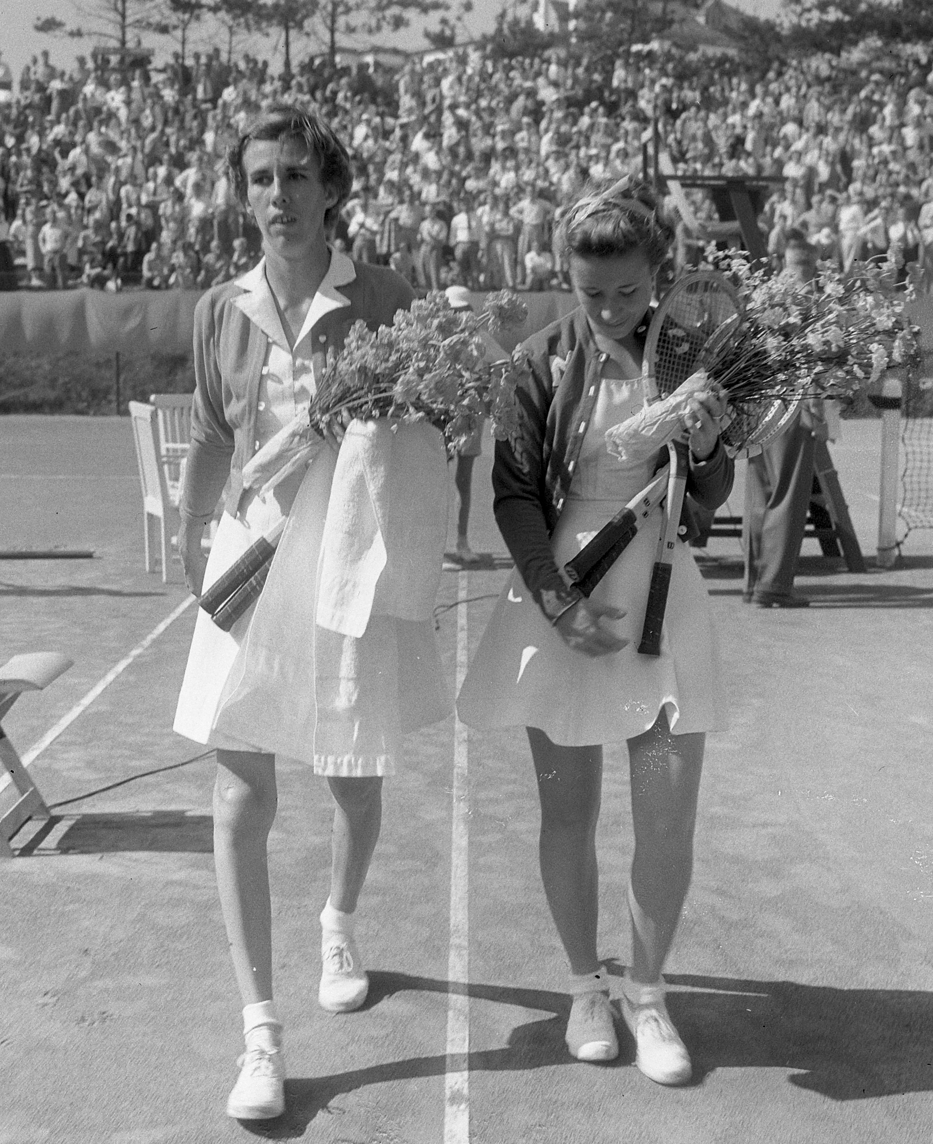 Tennis Noordwijk. Maureen Connolly (rechts) en Doris Hart (links)